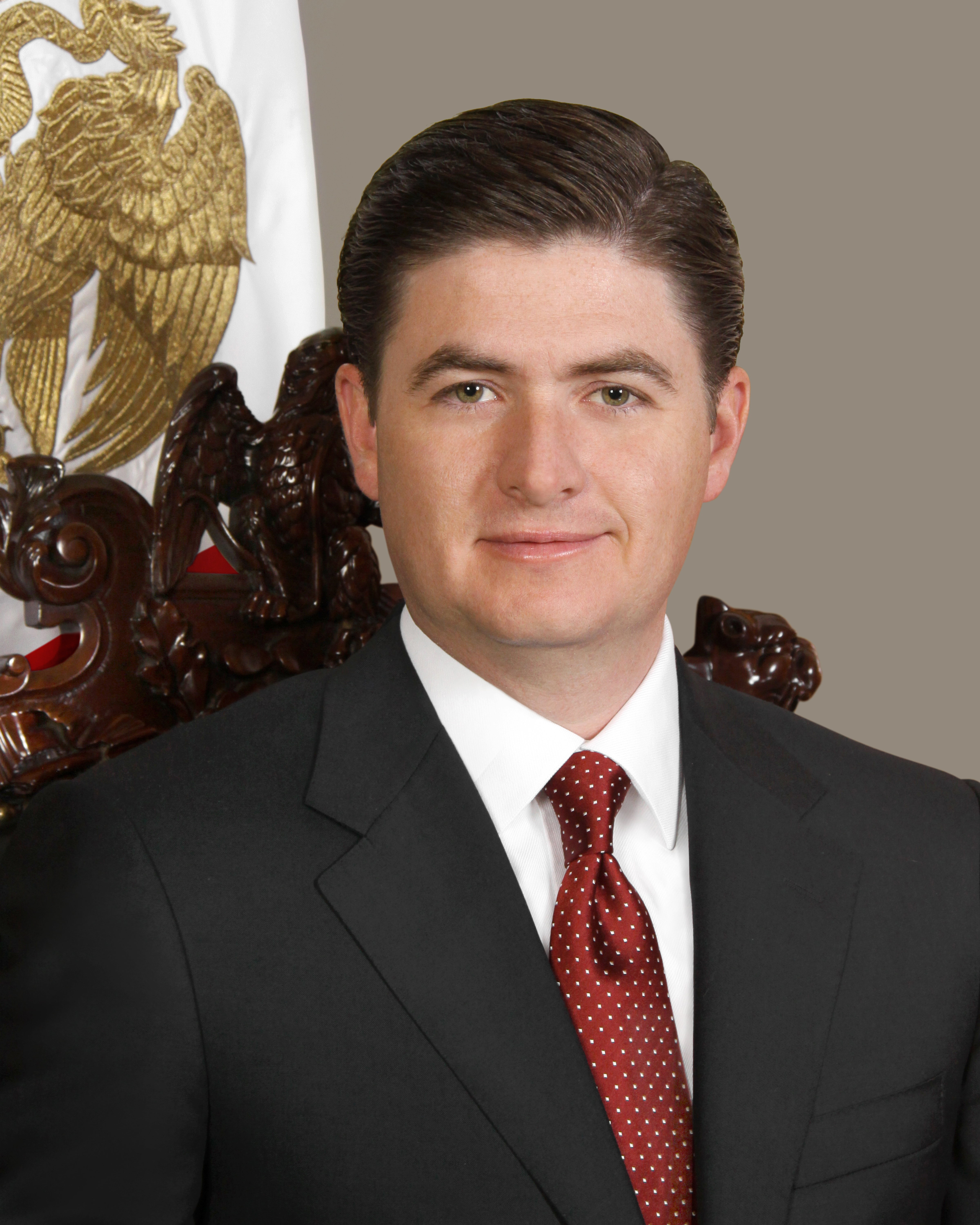 Foto de Rodrigo Medina de la Cruz, Gobernador del Estado de Nuevo León